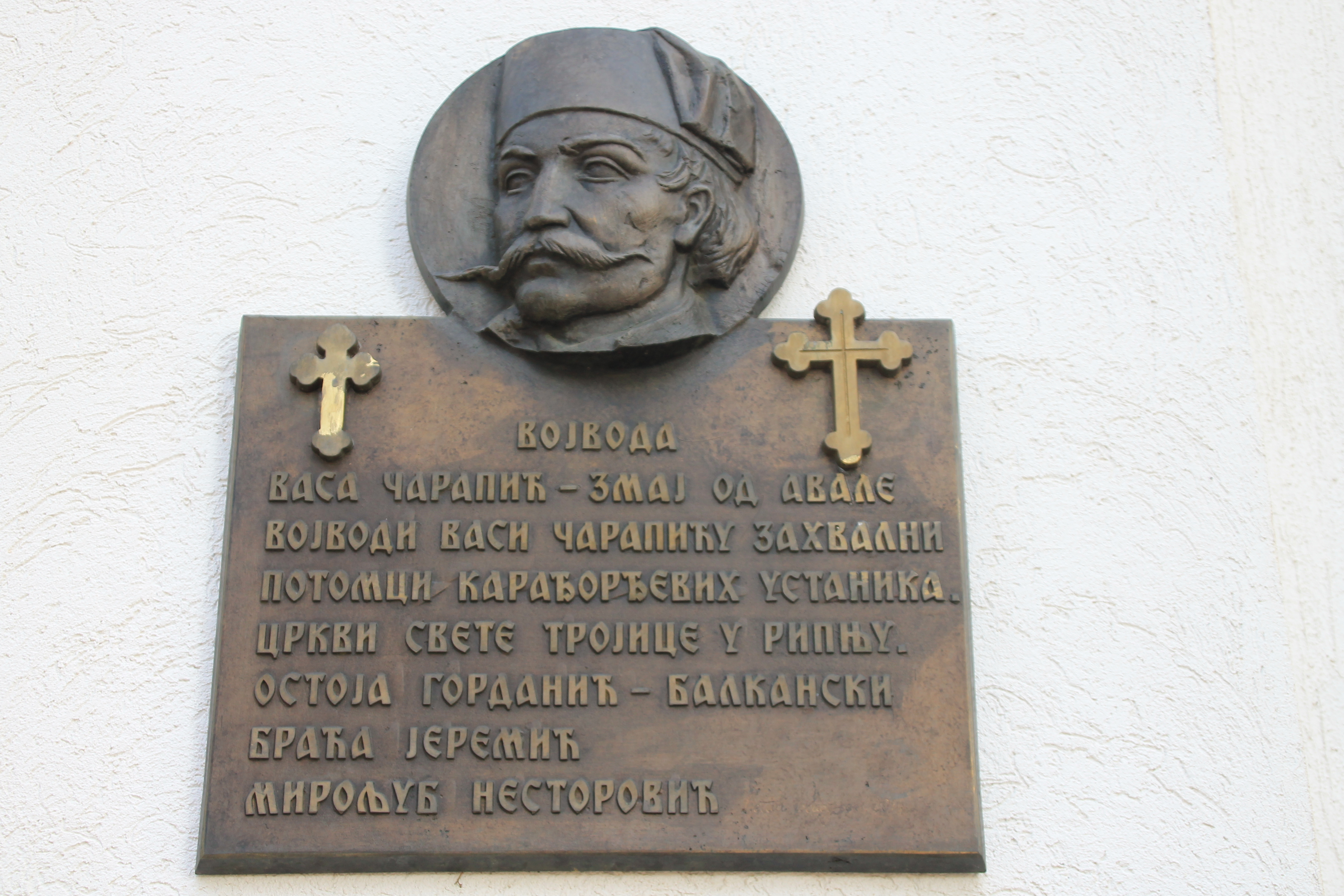 Crkva Svete Trojice (Ripanj)